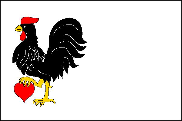 Vlajka obce Jindřichov (okres Bruntál)